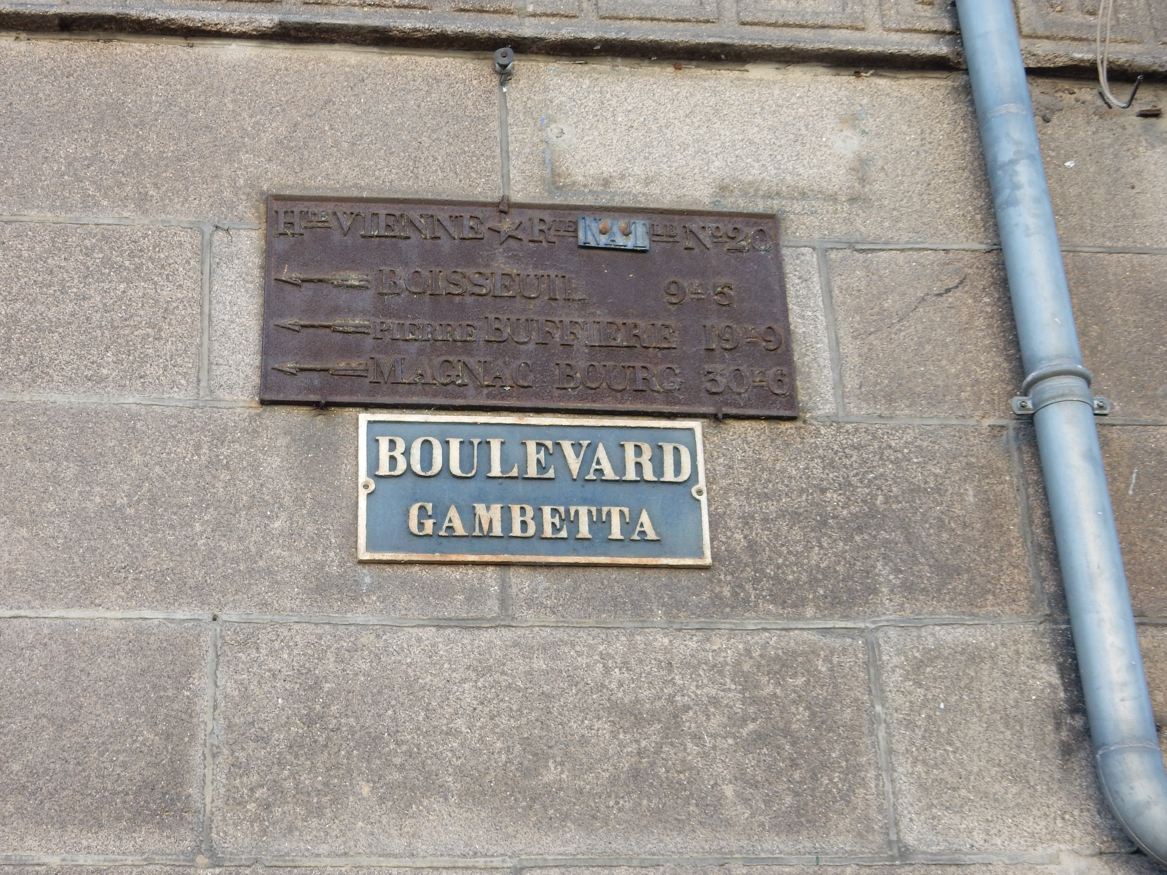 Ancienne plaque de direction de la RN 20 à Limoges, boulevard Gambetta